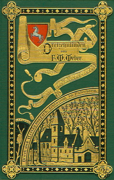 Vordereinband (Cover) der Originalausgabe von Friedrich Wilhelm Webers „Dreizehnlinden“.